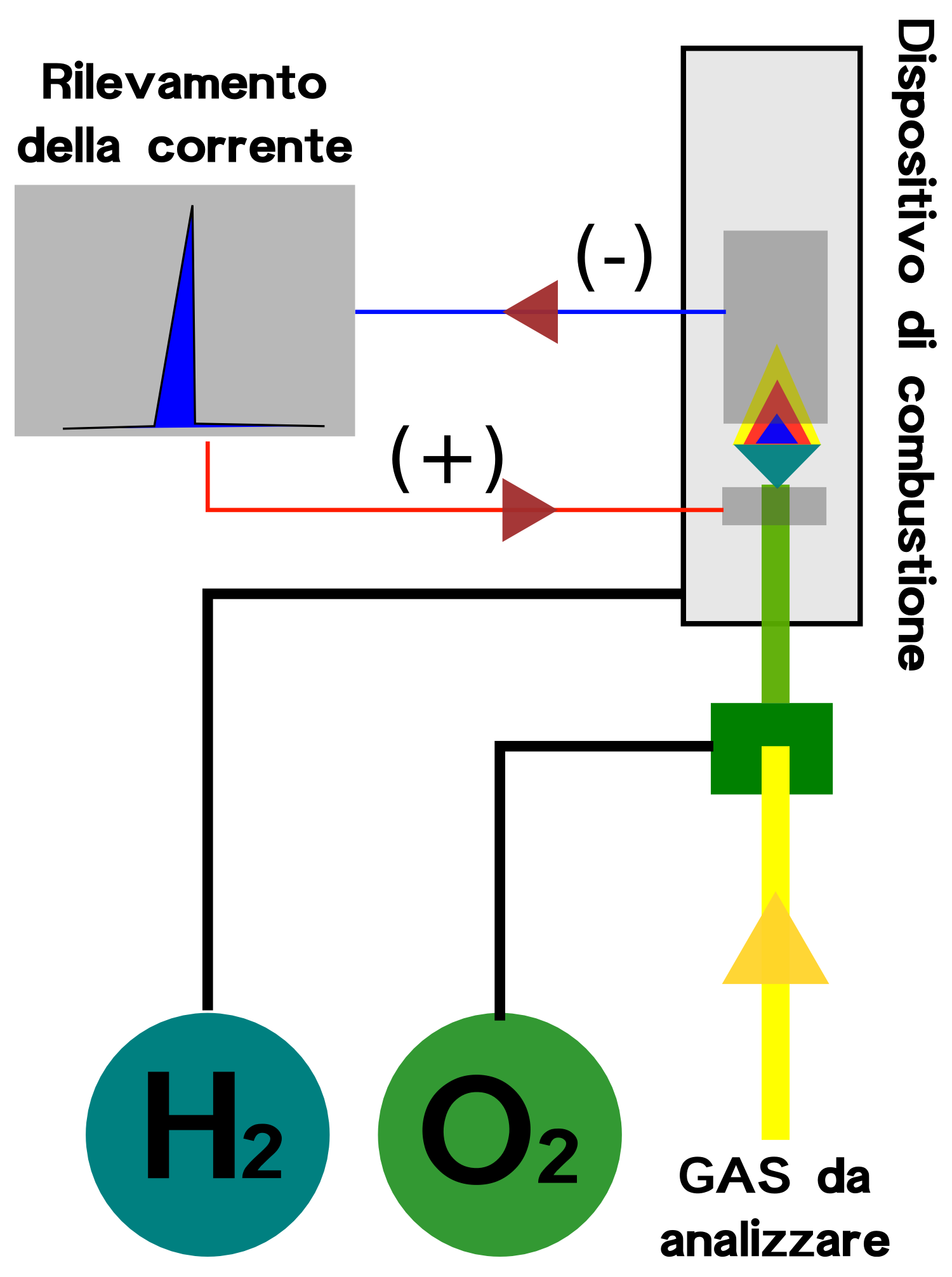 Schema dispositifo FID